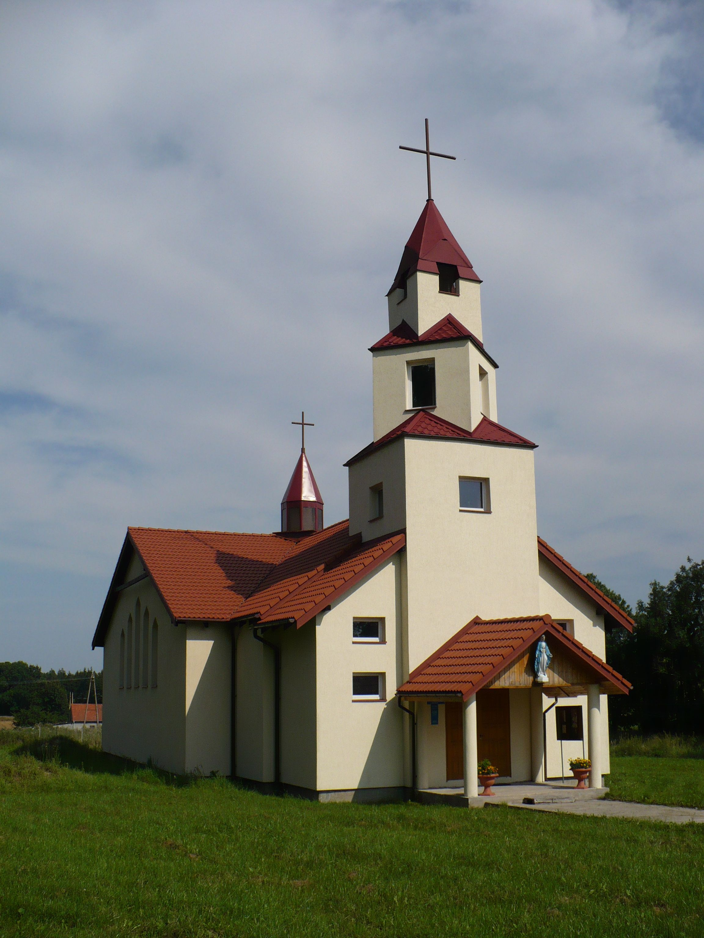 Kościół w Nikielkowie